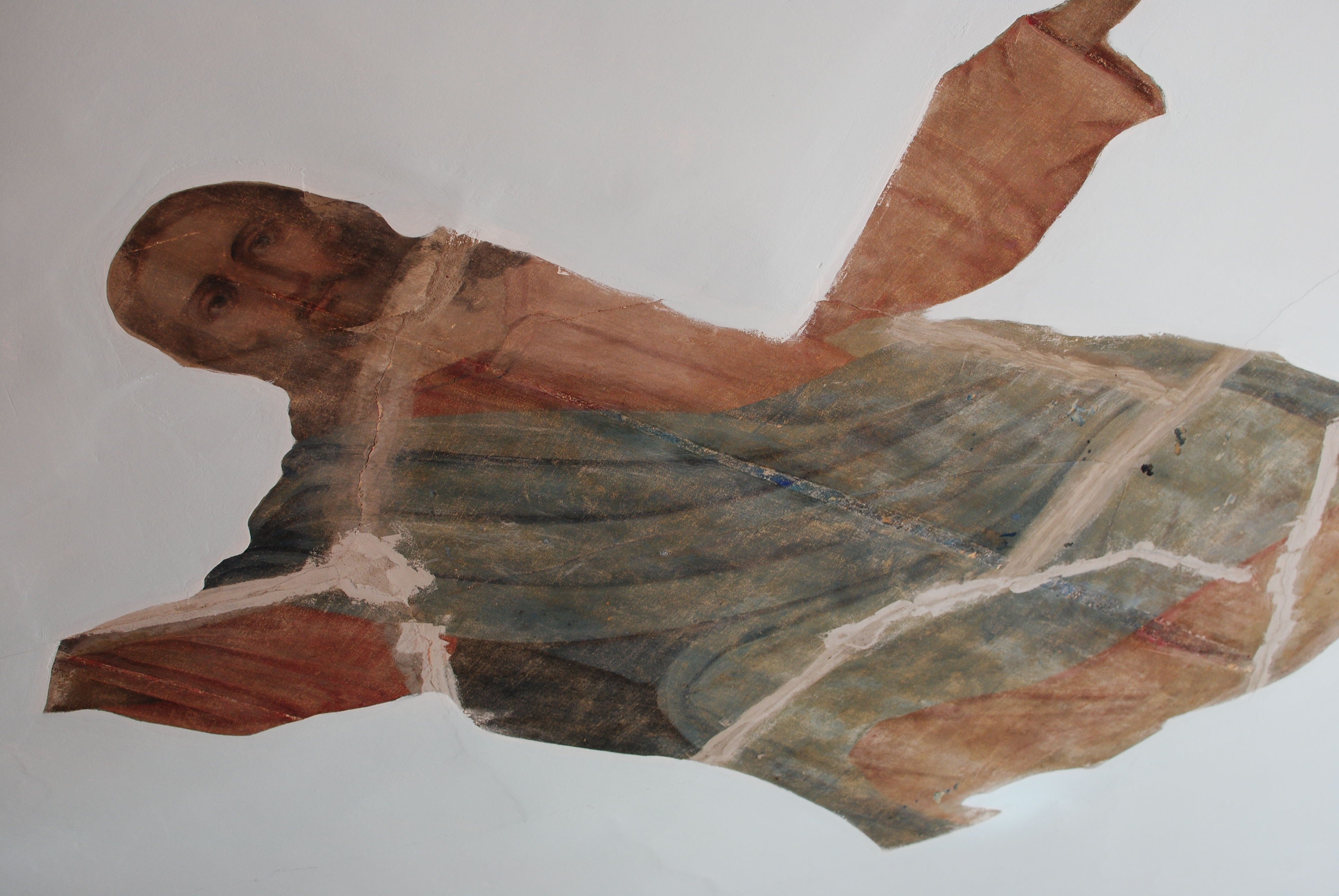 Фрагмент сохранившейся росписи в Покрово-Болдинском монастыре (Астрахань)